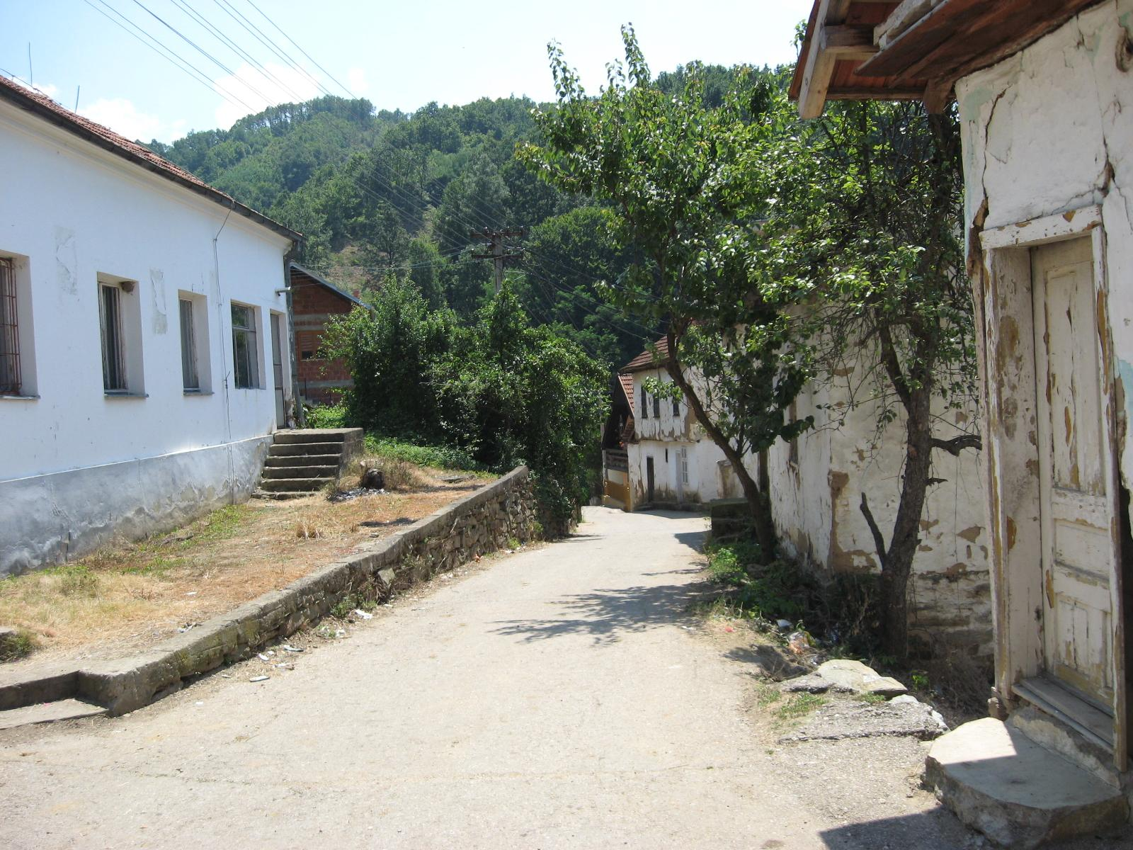 Sopstvena slika sela Dadince centar sela